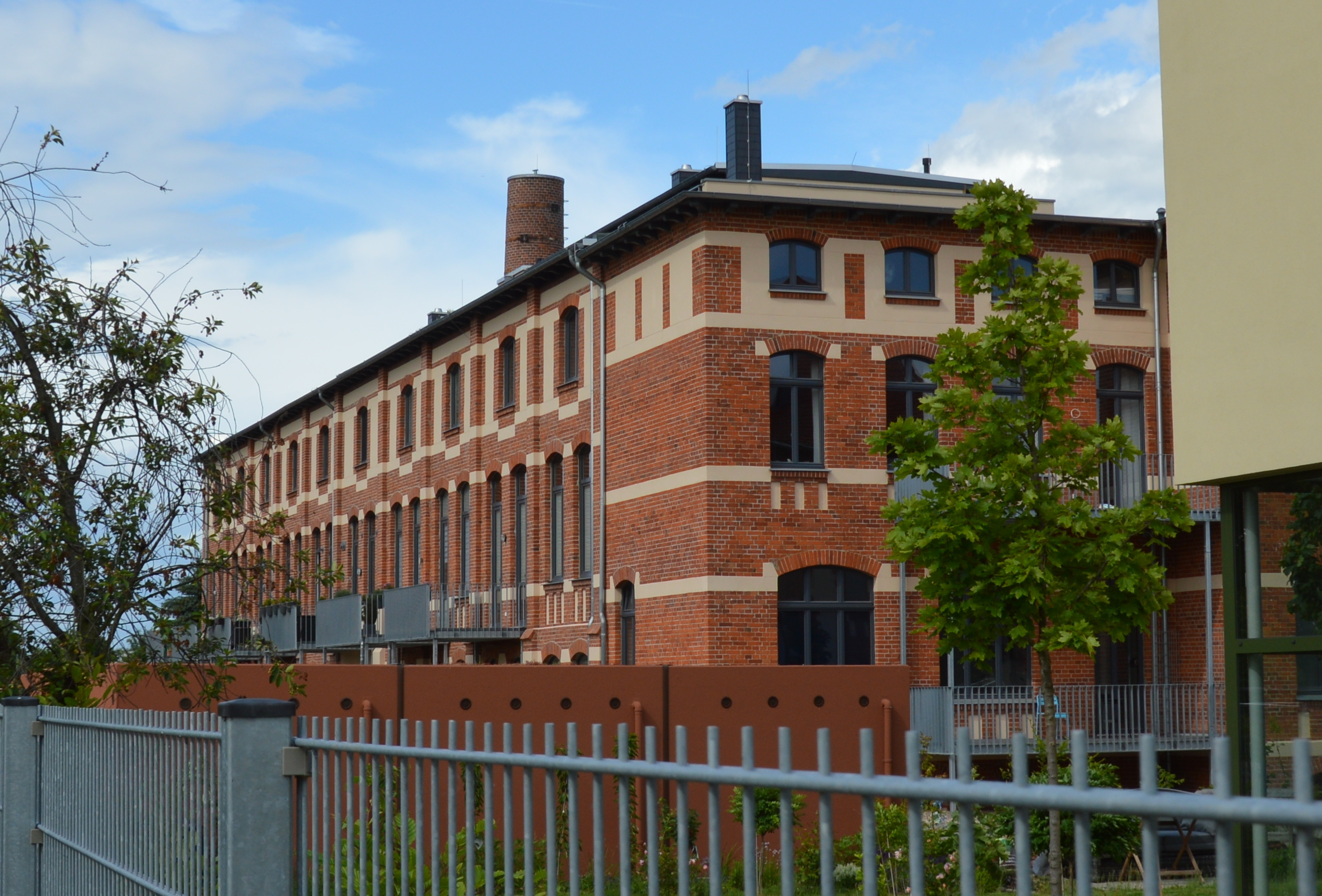 Haus Braunschweiger Straße 44 in Magdeburg, Fabrik